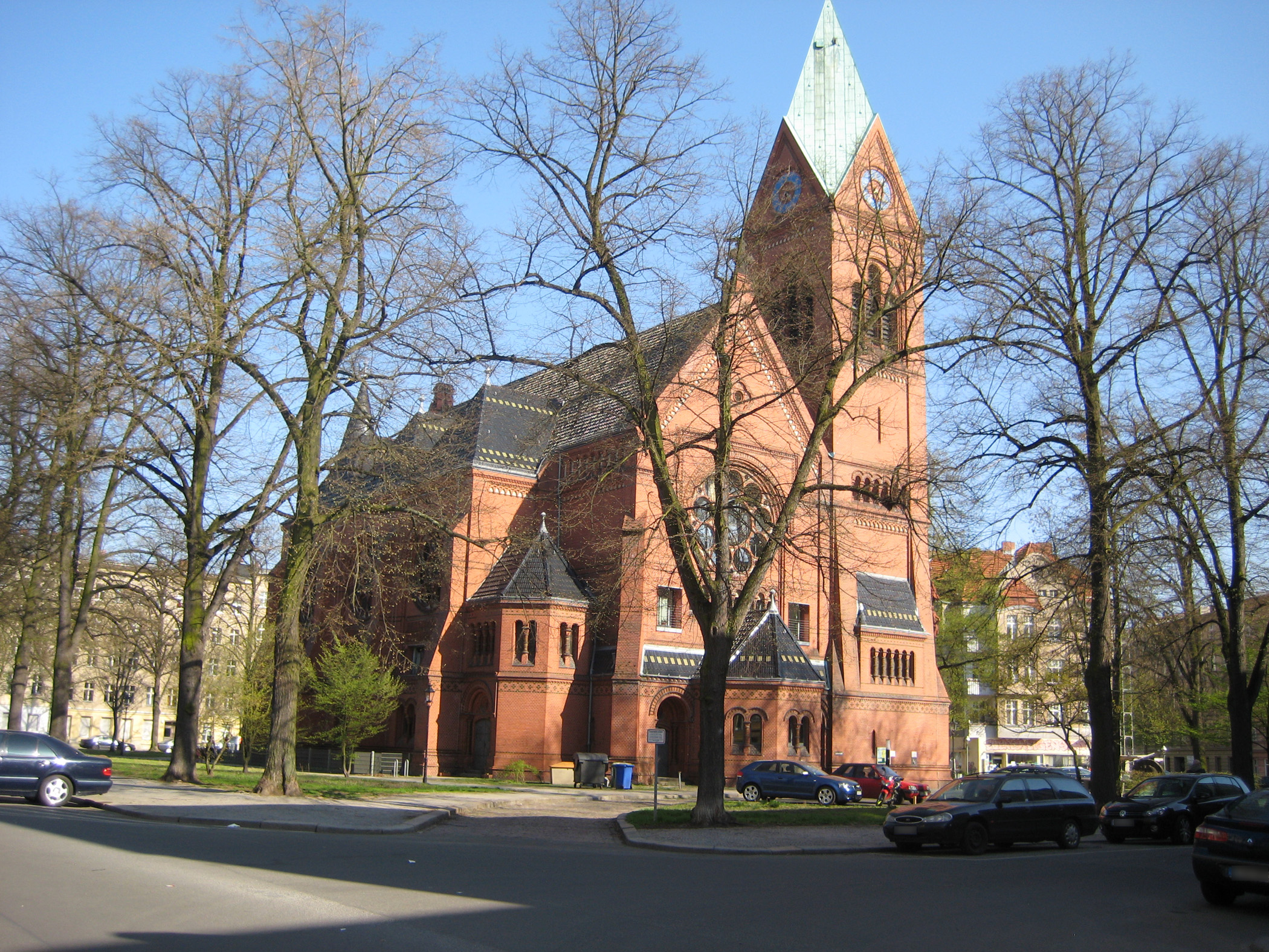 Berlin-Spandau: Lutherplatz